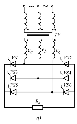 Файл запозичений з конспекту лекцій з курсу "Енергетична елетроніка" факультету електроніки НТУУ"КПІ".